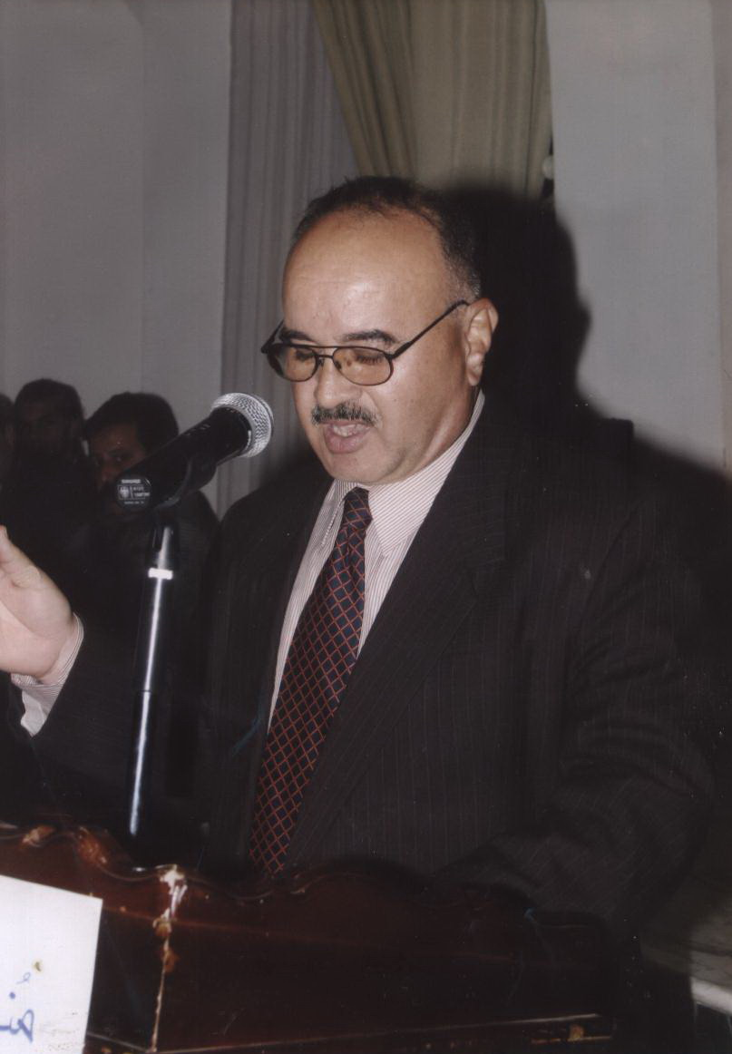 dr.yousef Migdadi _in_a_talk